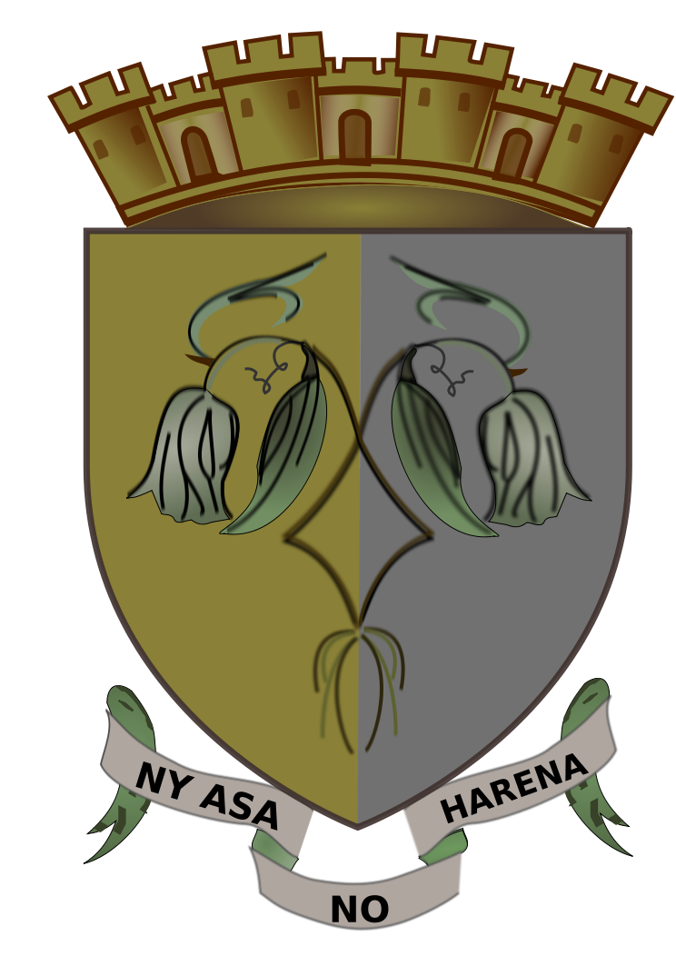 Blason d'Antalaha